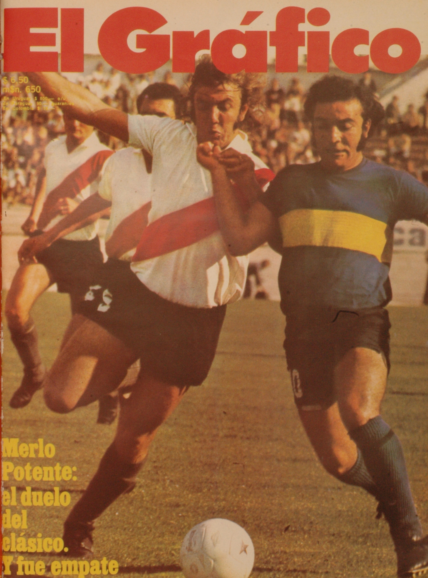 El Grafico del 06 de Noviembre de 1974. Edicion 2874